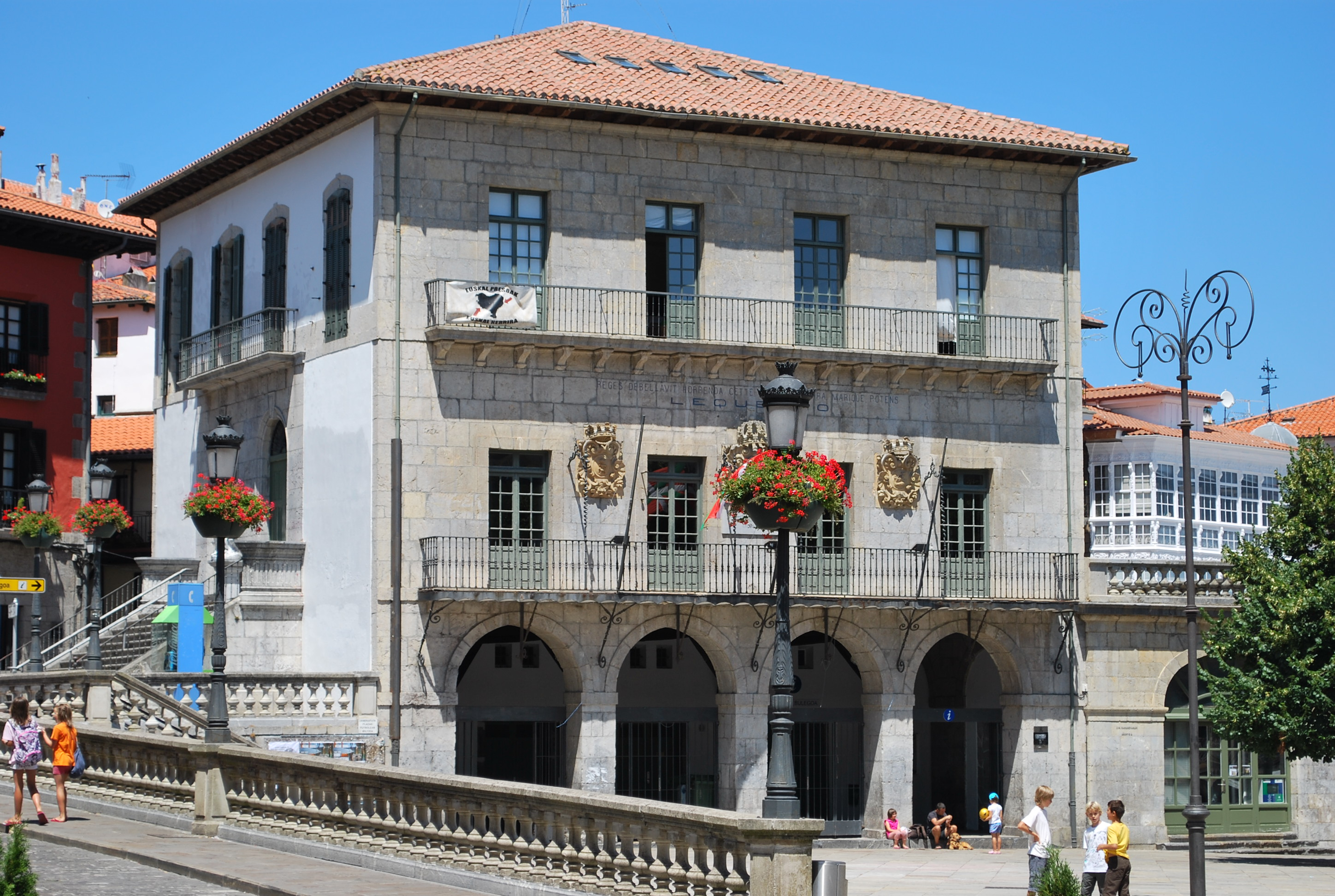 Mairie sur la place de Lekeitio (Biscaye).